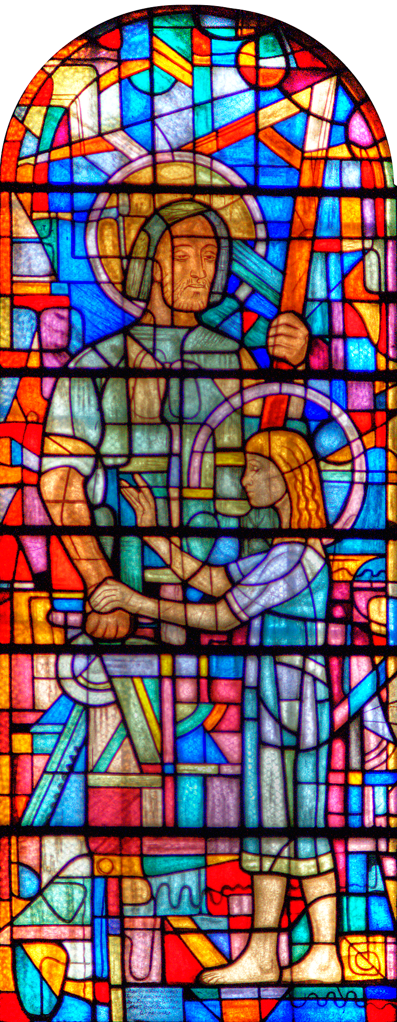 Witraż św. Józefa Robotnika w Bazylice katedralnej Wniebowzięcia NMP w Płocku